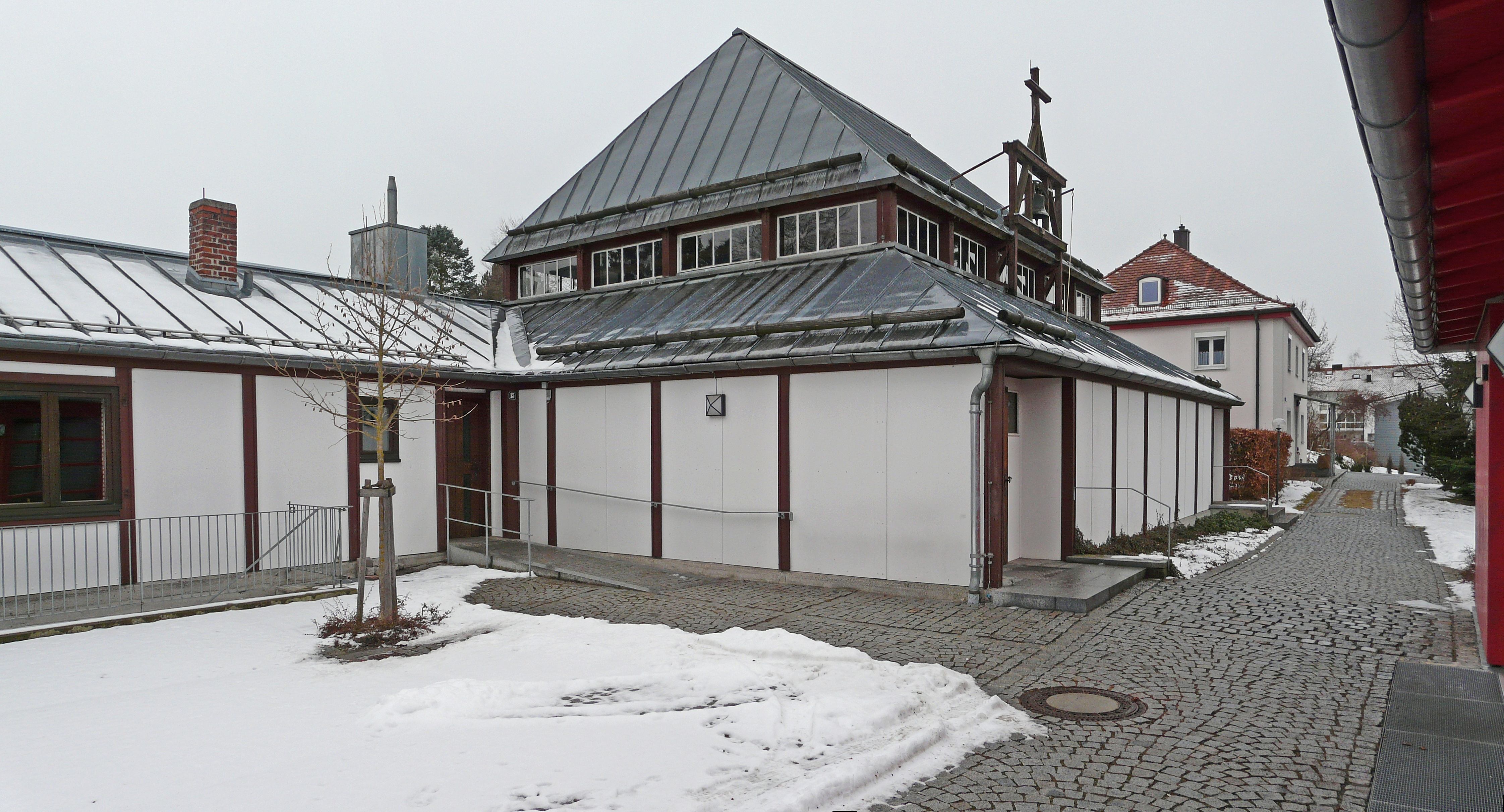 Die Christuskirche in Viechtach (Bayerischer Wald), ein Gemeindezentrum ("Notkirche" Typ D) des Architekten Otto Bartning.